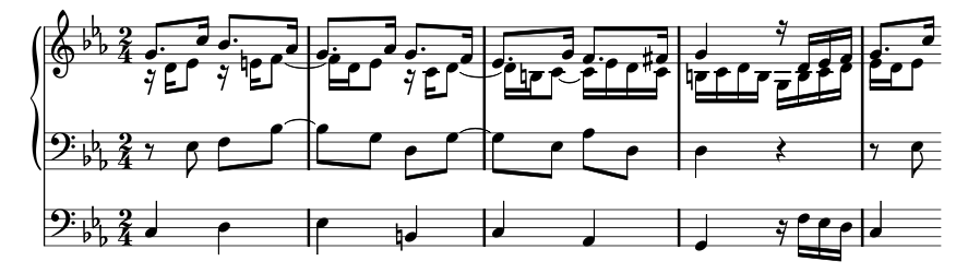 Premières mesures du Mederato op. 44 n° 7 pour orgue de Boëly.